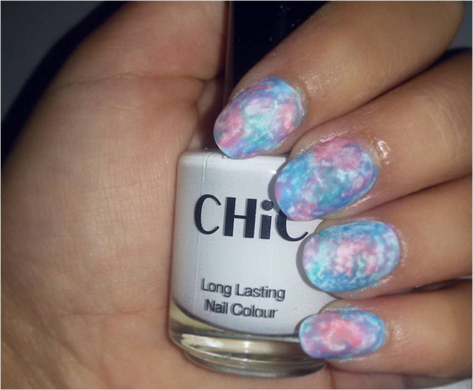 ציפורן מלאכותית מודבקת על ציפורן טבעית וצבועה בלק לציפורניים